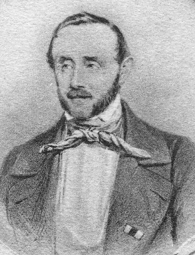 Karl Friedrich Theodor von Flotow (* 9. November 1791 in Pritzwalk; † 9. Februar 1871 in Berlin war königlich preußischer Generalmajor und zuletzt Kommandeur der 3. Kavallerie-Brigade. Hier als Kommandeur des Ulanen-Regiments "Großherzog Friedrich von Baden" (Rheinisches) Nr. 7